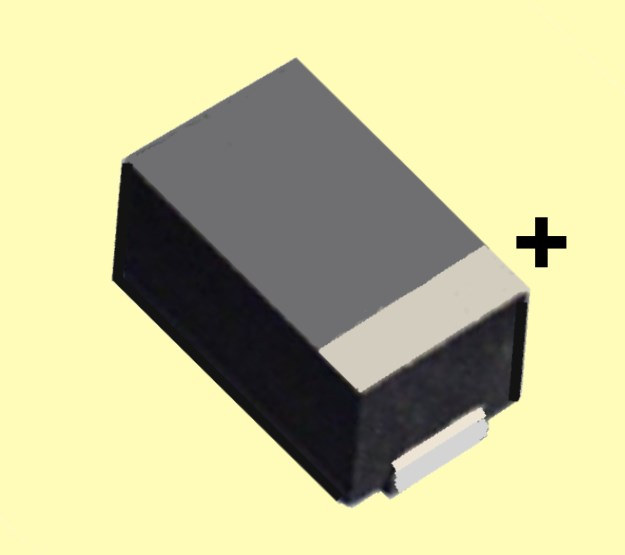 Darstellung der Polaritätskennzeichnung bei quaderförmigen Polymer-Aluminium-Elektrolytkondensatoren